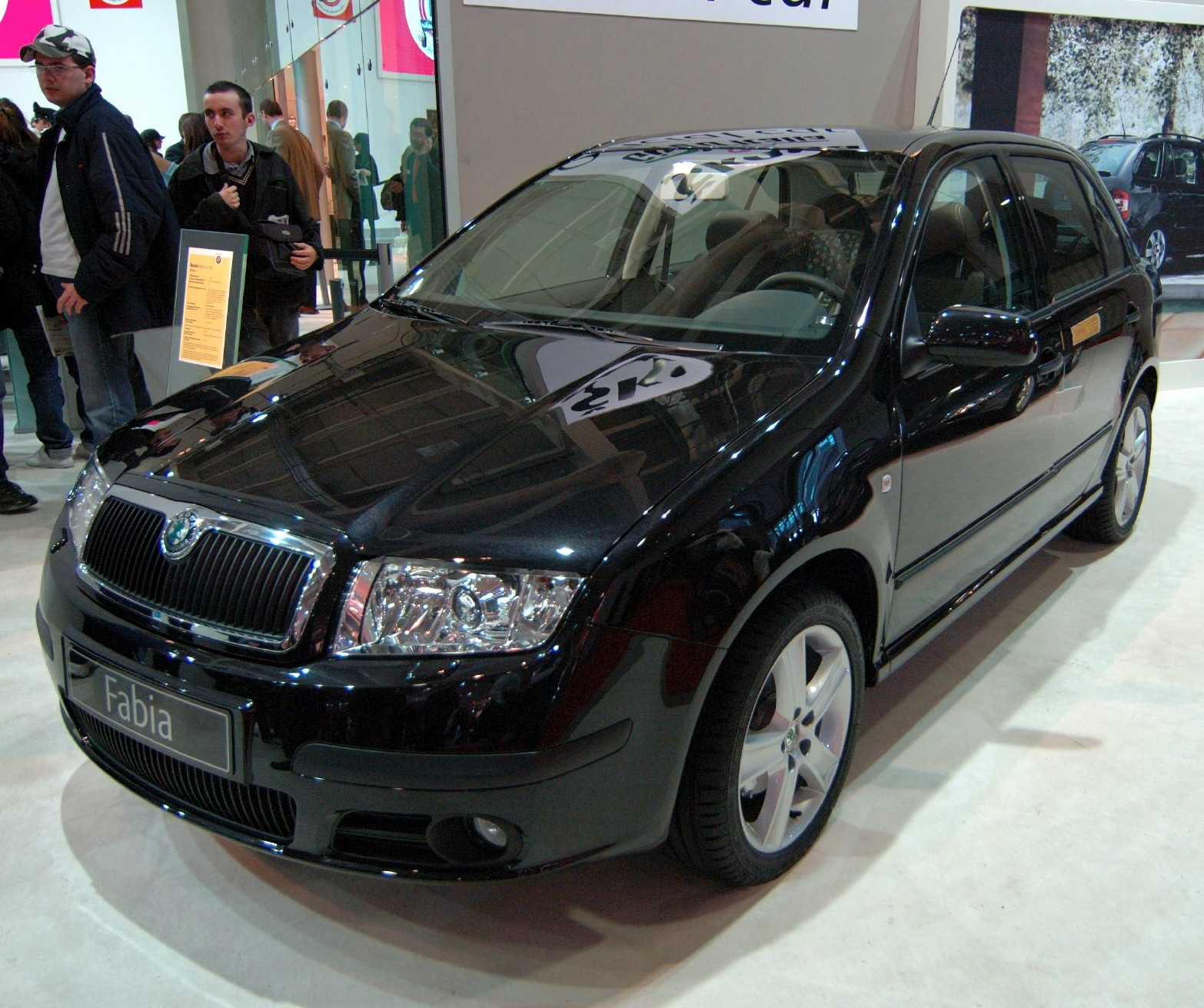 Škoda FabiaSkoda